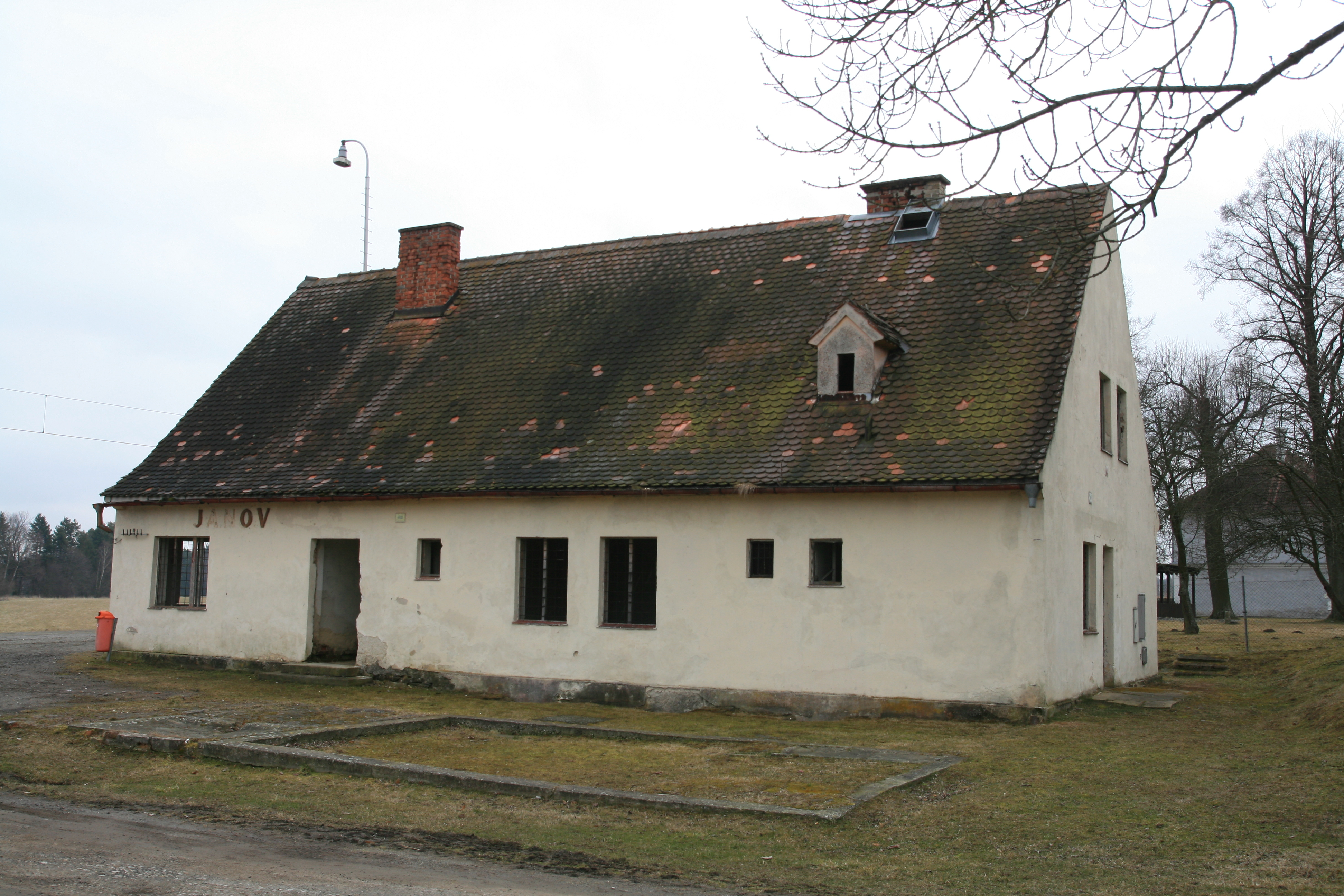 Obec Bujanov v okrese Český Krumlov. Budova železniční zastávky, v pozadí vpravo muzeum konězpřežky.